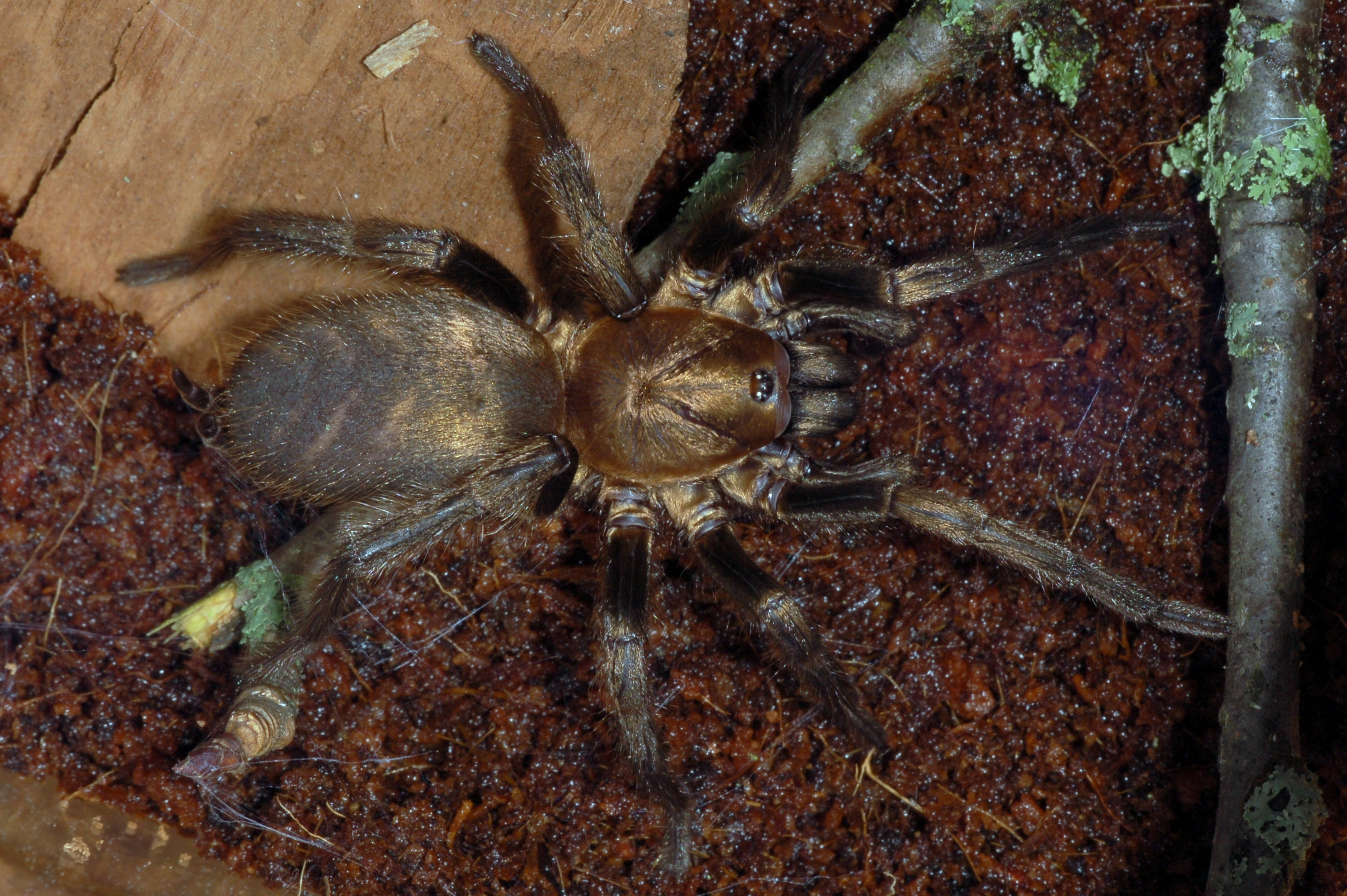 Braune Falltürspinne Acanthogonatus francki (Fam. Nemesiidae) in Gefangenschaft, Museum Wiesbaden, Deutschland